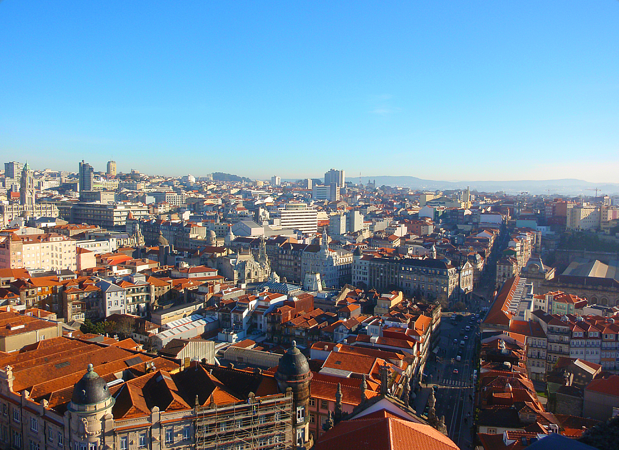 Porto (Portugal)